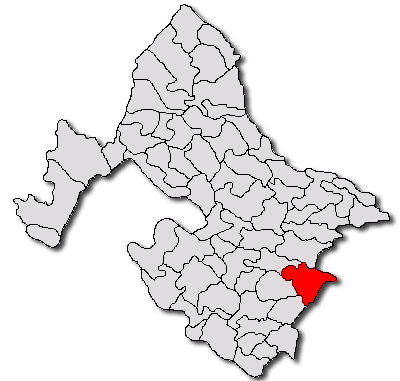 Categorie:Hărţi ale judeţului Mehedinţi